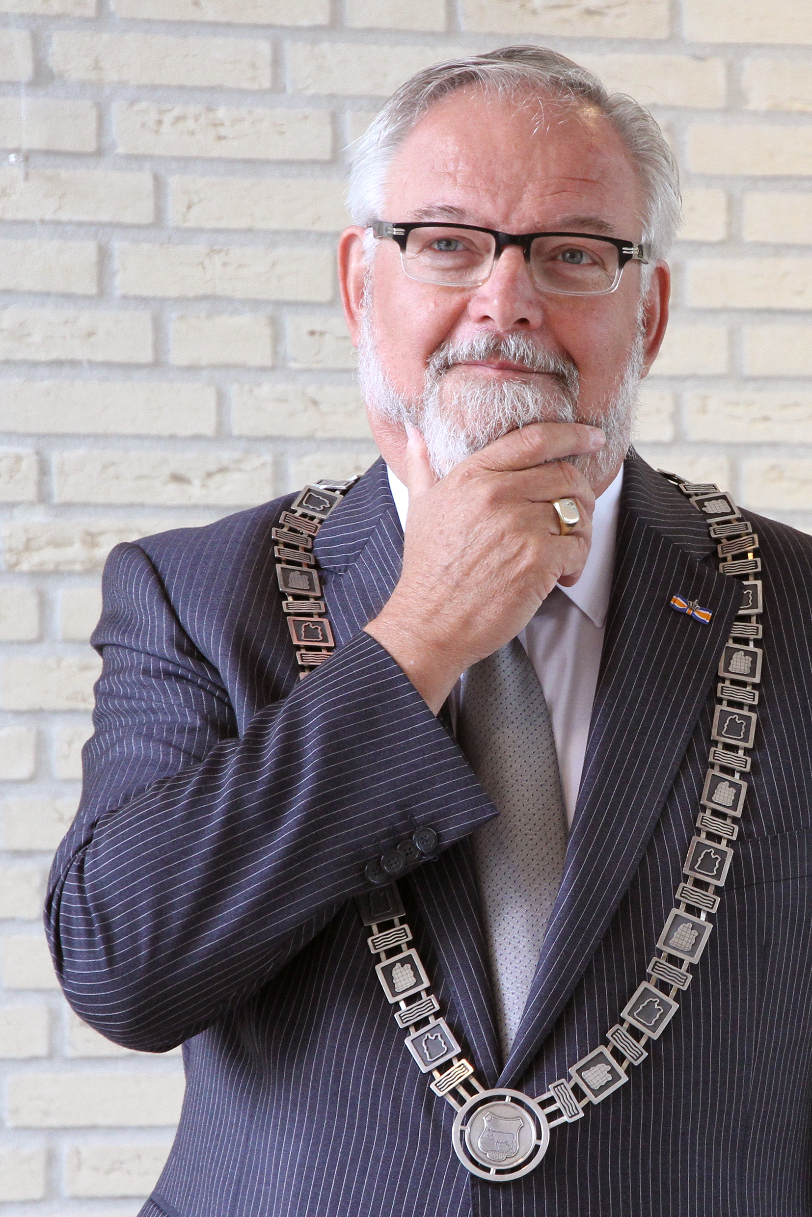 Harry Brinkman